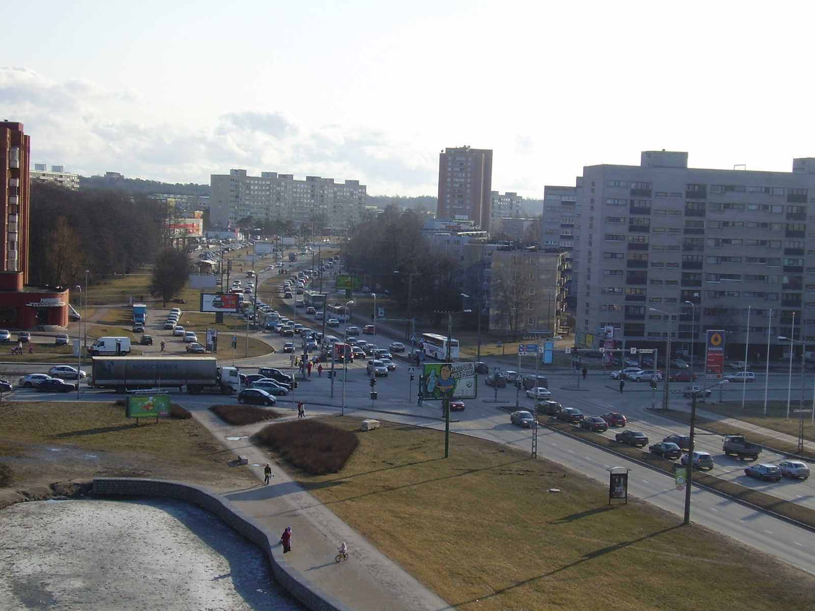 Sõpruse puiestee ja A. H. Tammsaare tee ristmik.